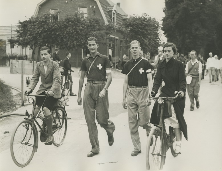 De twee Zwitserse deelnemers, A. Hürlimann en A.D. Bestebreurtje, onderweg tijdens de 26e Vierdaagse.